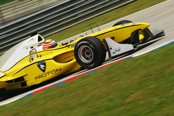 Alex Yoong (A1 GP Team Malaysia) during A1 GP Malaysia 2006/07 (Round 4) at Sepang circuit